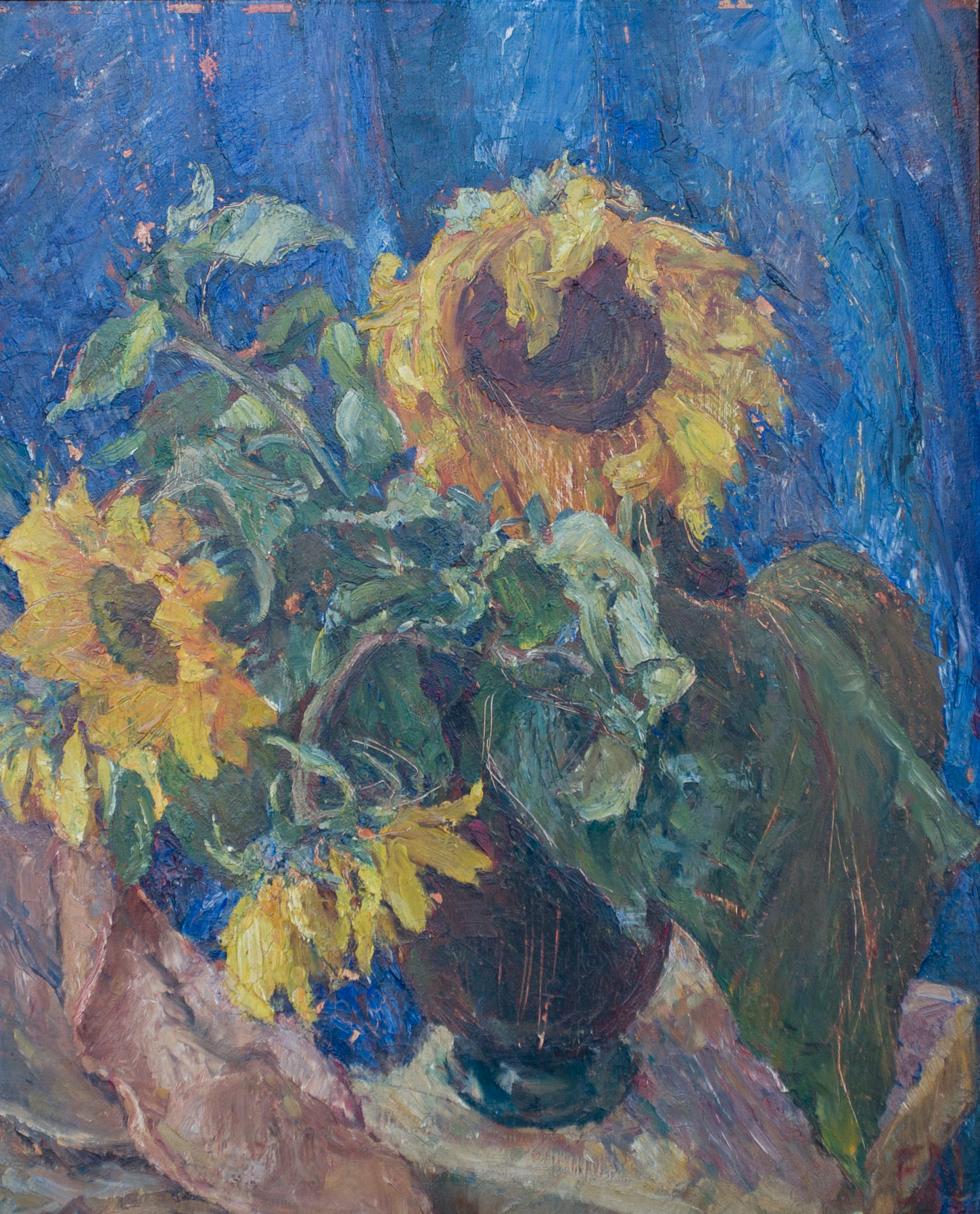 "Sonnenblumen" Öl 1929, Privatbesitz, Foto: Victor Ströver